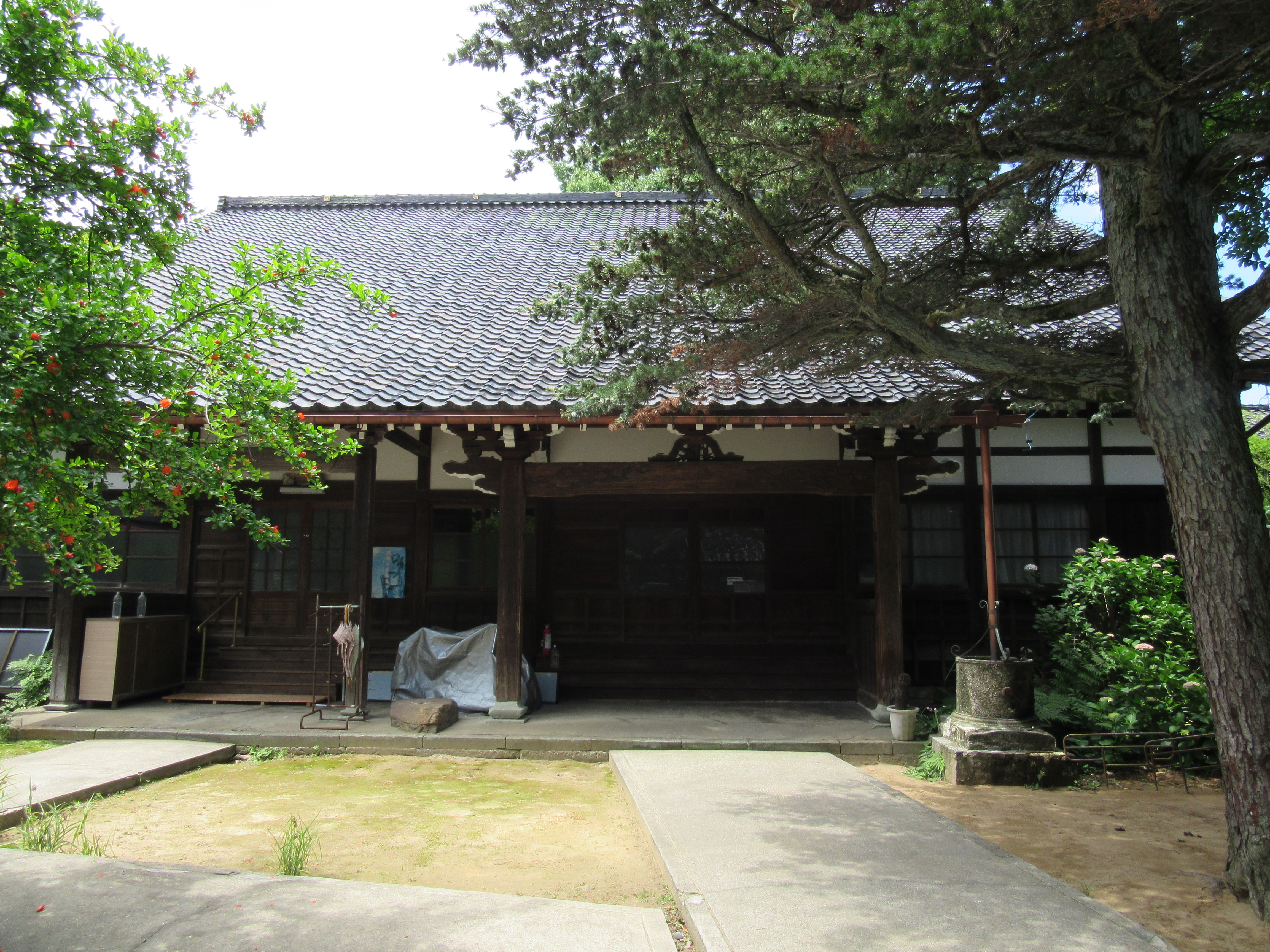 興徳寺（金沢市）